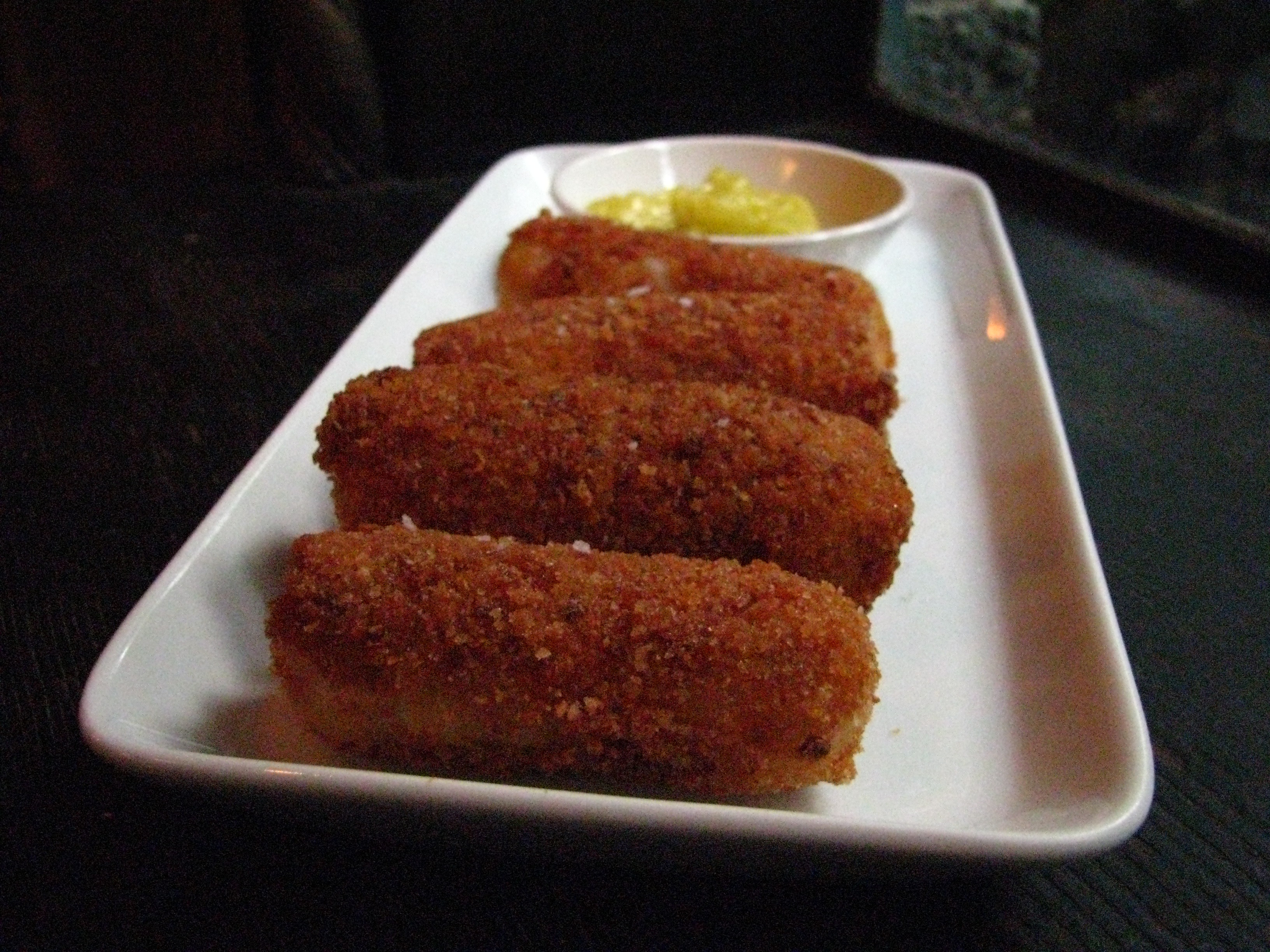 Ravioles du Champsaur